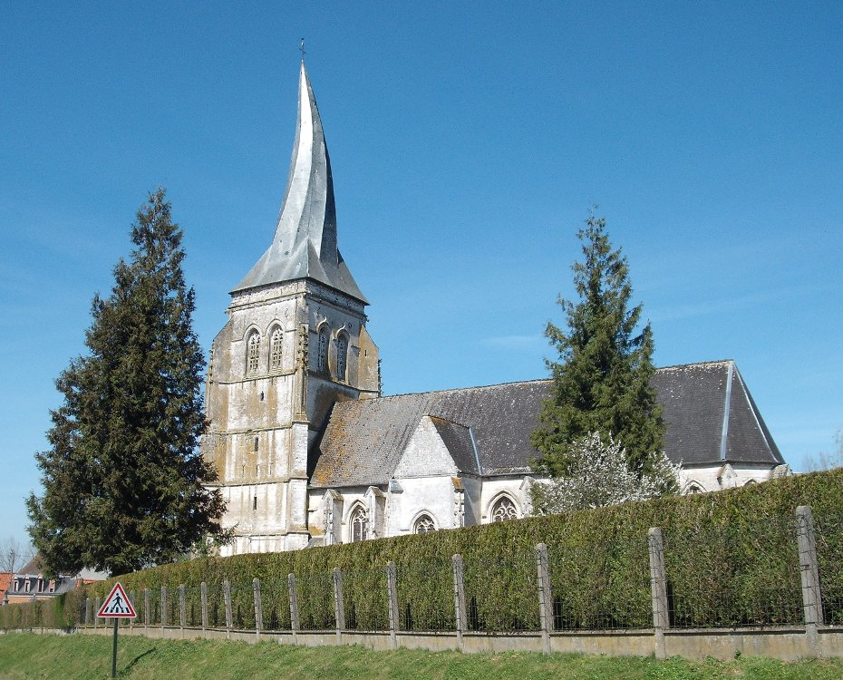 Eglise de Verchin